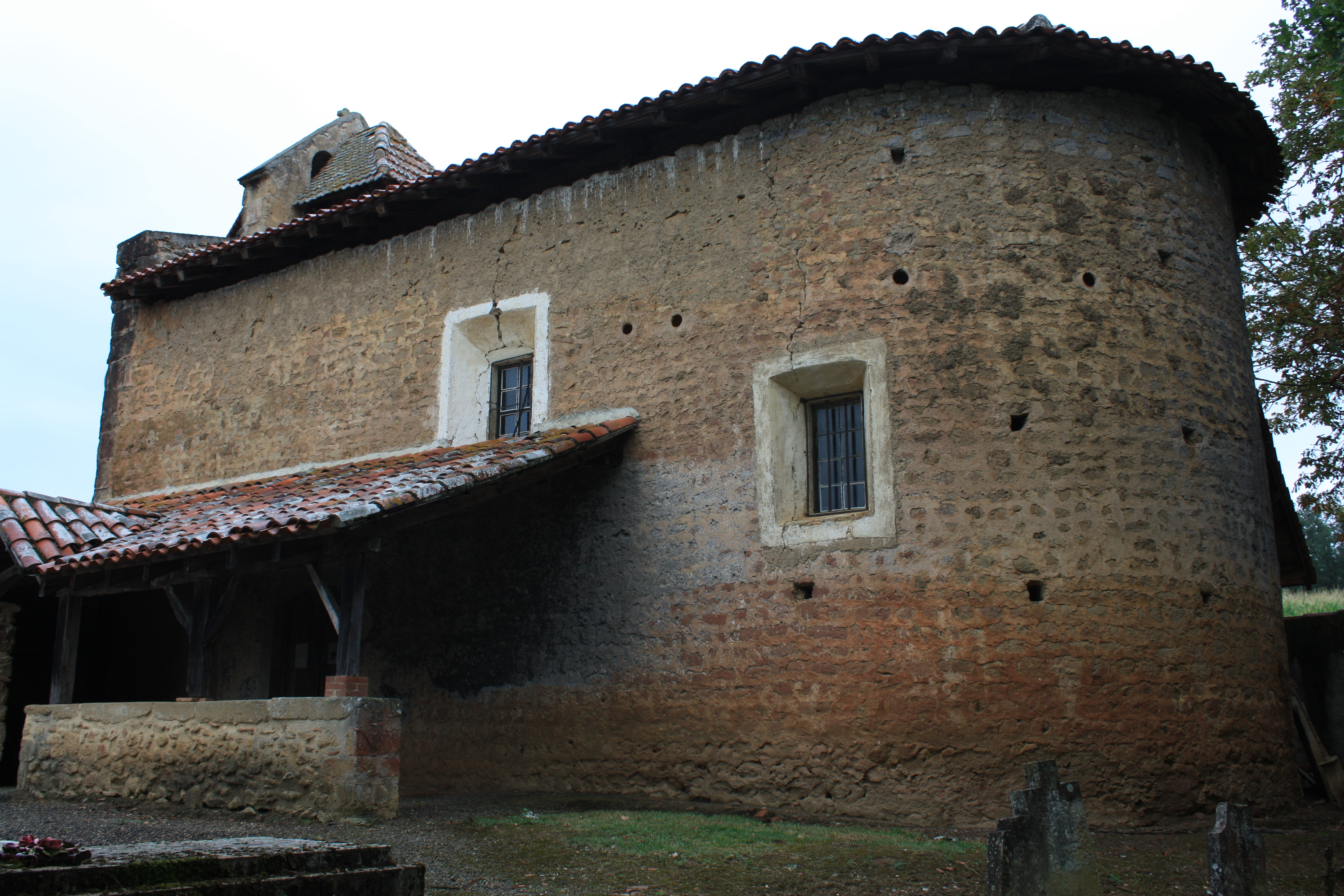 Ponsampère - Eglise Notre-Dame-des-Neiges de Lafitte